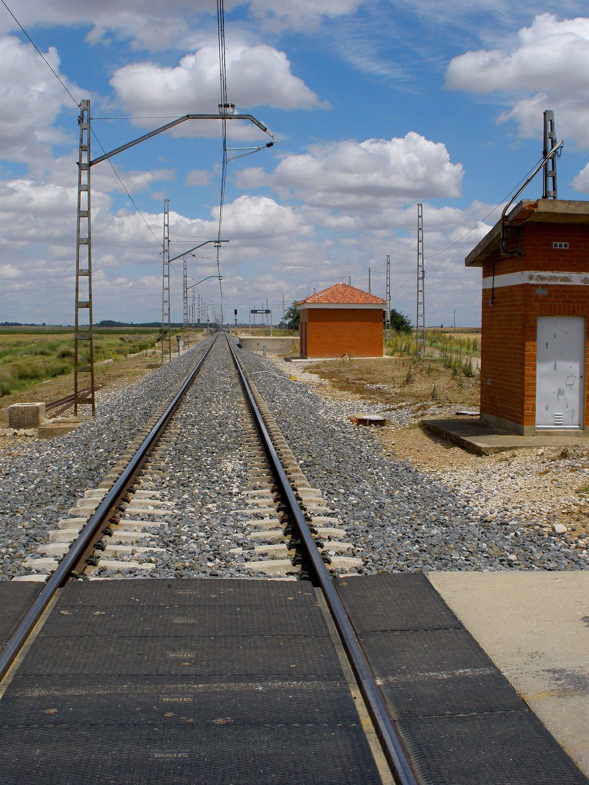 Apeadero de Amusco (Palencia)